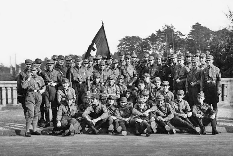 Berlin, Horst Wessel mit 34. SA-Sturm Scherl: Horst Wessel mit seinem Sturm im Jahr 1929 ADN-ZB/Archiv: Horst Wessel, faschistischer SA-Führer geb. am 9.10.1907 in Bielefeld gest. am 23.2.1930 in Berlin, Schöpfer des Liedes "Die Fahne hoche" (Horst-Wessel-Lied). Der 34. SA-Sturm in Berlin-Friedrichshain, den Wessel (1. stehende Reihe, 8 v.r.) Ende der zwanziger Jahre führte. Aufn. 1929 12798-37 Abgebildete Personen: Wessel, Horst: SA-Sturmführer, 1930 erschossen, Deutschland (GND 118631721)